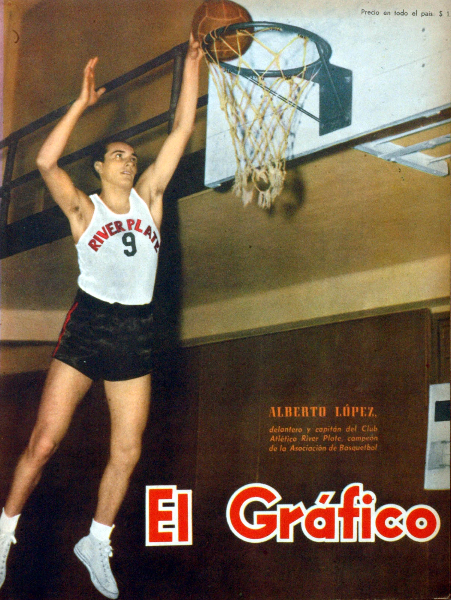 El Grafico del 22 de Febrero de 1952. Edicion 1698